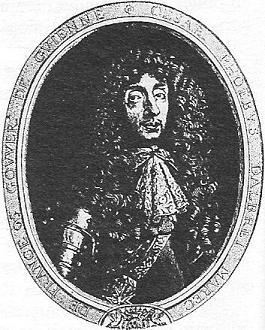 césar d'albret 1652